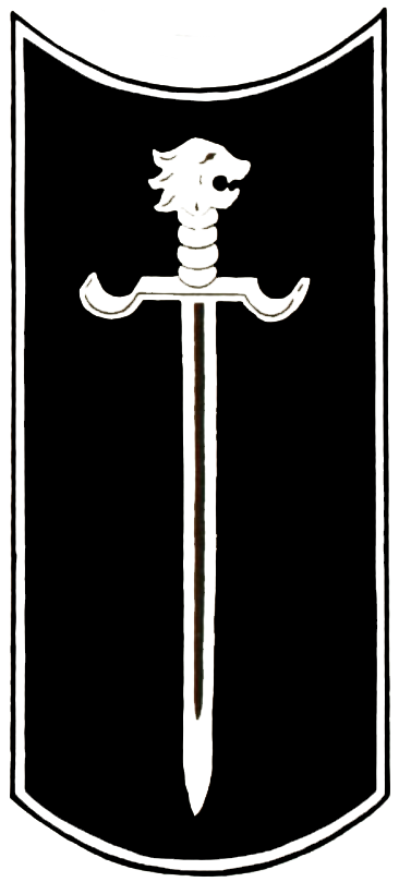 Escudo de Avanzada Nacional